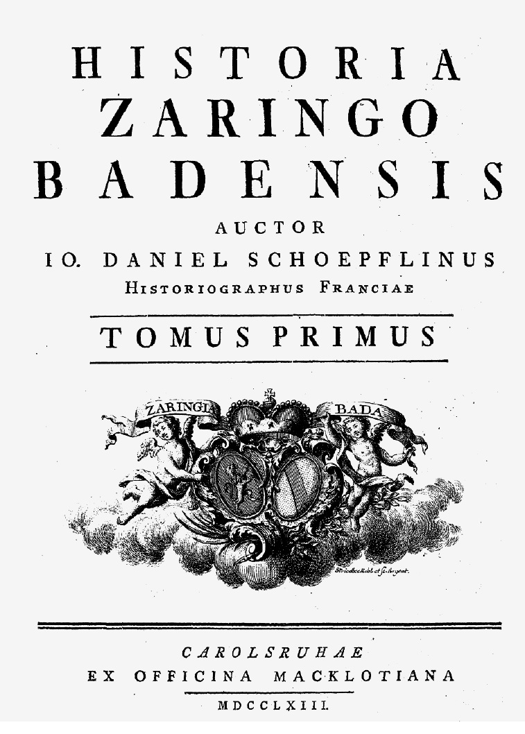 Titel-Blatt der Historia Zaringo-Badensis